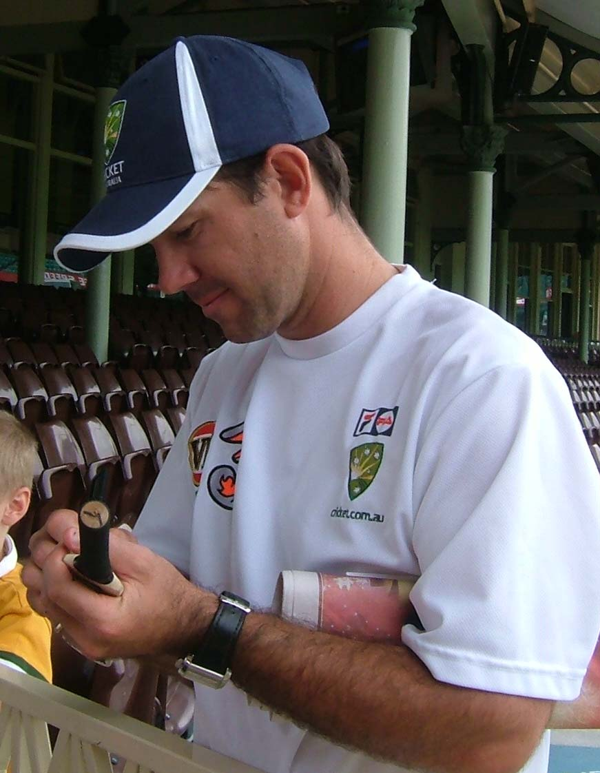 Ponting signing